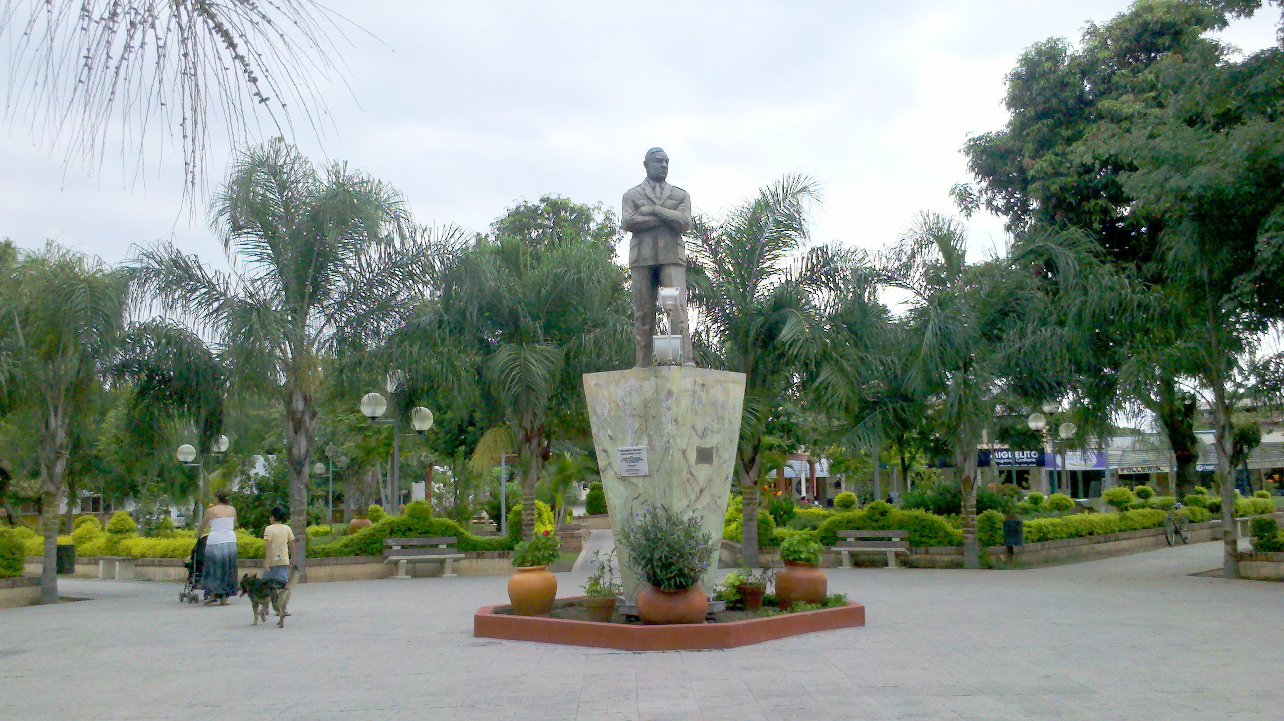 El General - Plaza - Gral. Mosconi - San Martín